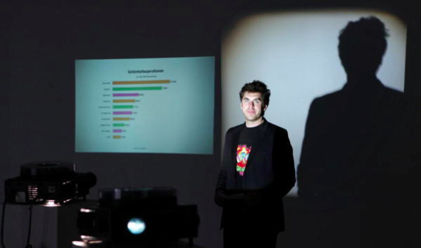 Jens Semjan im Stadthaus Ulm